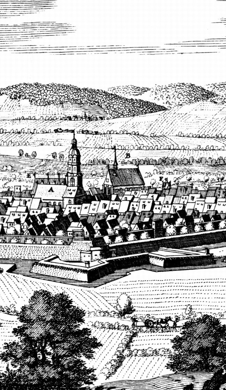 Einbeck Neustädter Marienkirche 1654